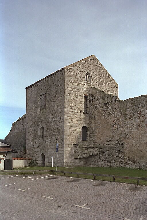 Östra delen med Kajsartornet. Motiv: Visby ringmur Nyckelord: Raä-Fastigheter, Riksintressen, Världsarv Kategori: Stadsvall/stadsmur Östra delen med Kajsartornet.